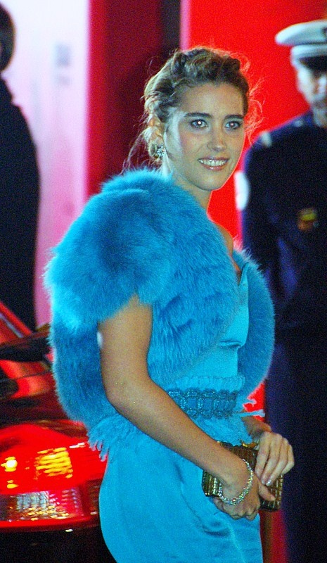 Vahina Giocante, cérémonie des Césars 2008.